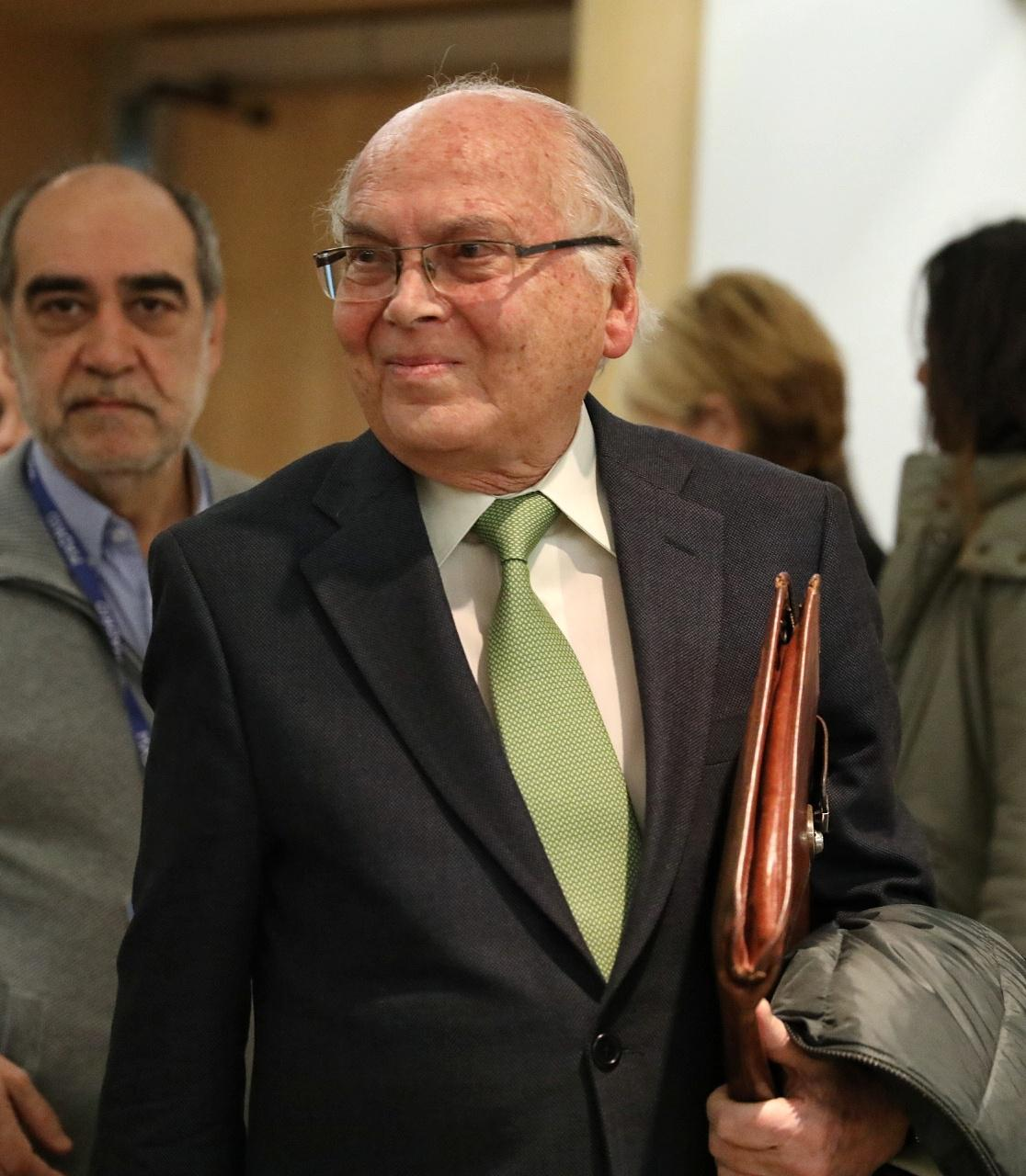 El Pleno del Ayuntamiento de Madrid en la sesión de hoy, 31 de enero, ha aprobado el nombramiento, con los votos a favor de Ahora Madrid y del grupo municipal socialista, del magistrado jubilado Carlos Granados como director de la Oficina Municipal contra el Fraude y la Corrupción.